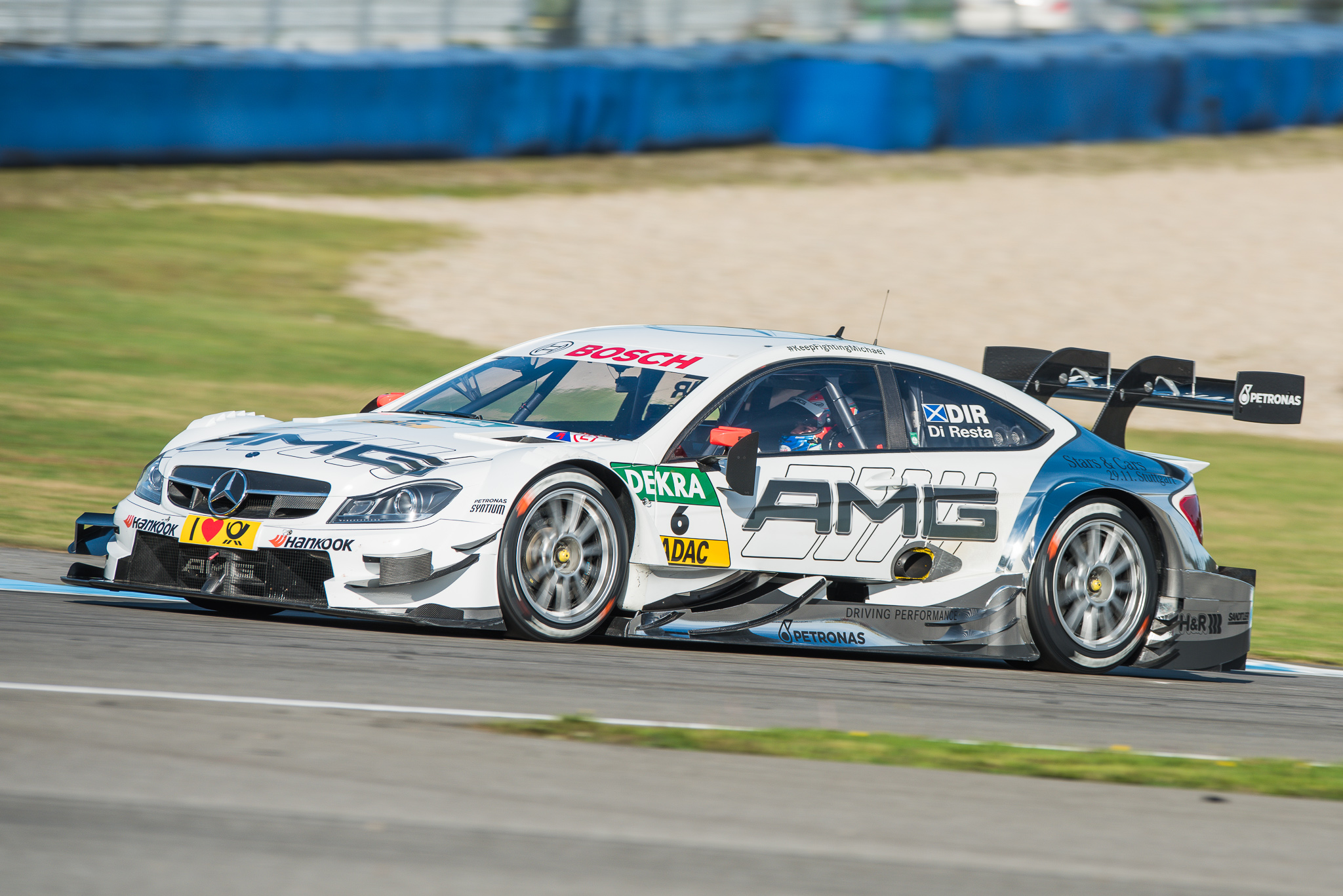 DTM,Deutsche Tourenwagen Masters,HWA AG,Hockenheimring,Mercedes AMG C-Coupe,Motorsport,Paul Di Resta